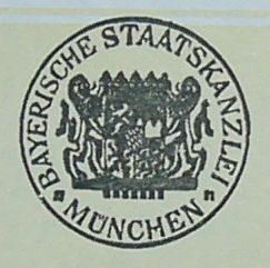 Dienstsiegel der Bayerischen Staatskanzlei, München